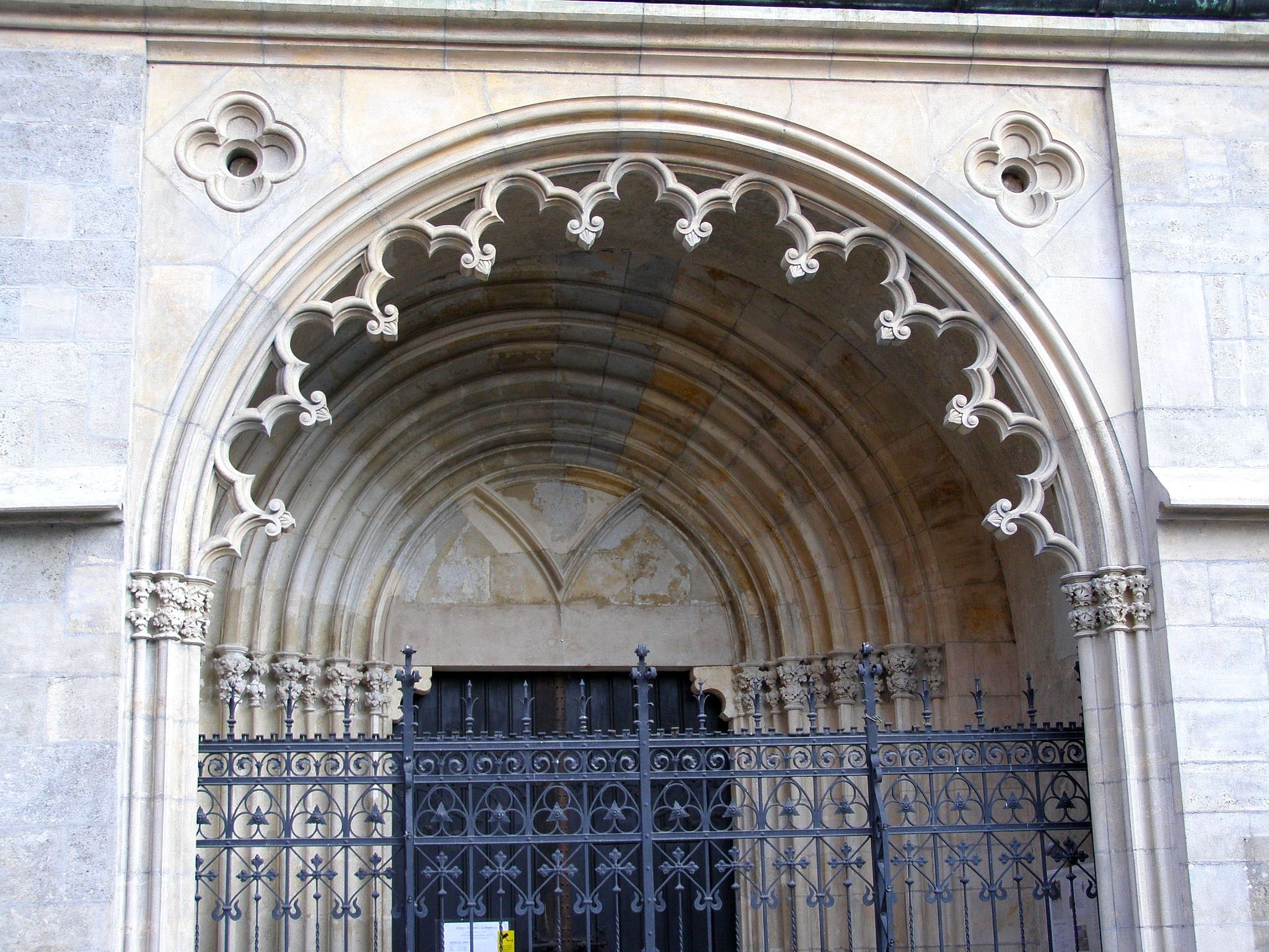 Hlavný severný portál zo začiatku 15. storočia s ostením neogotickej predsiene